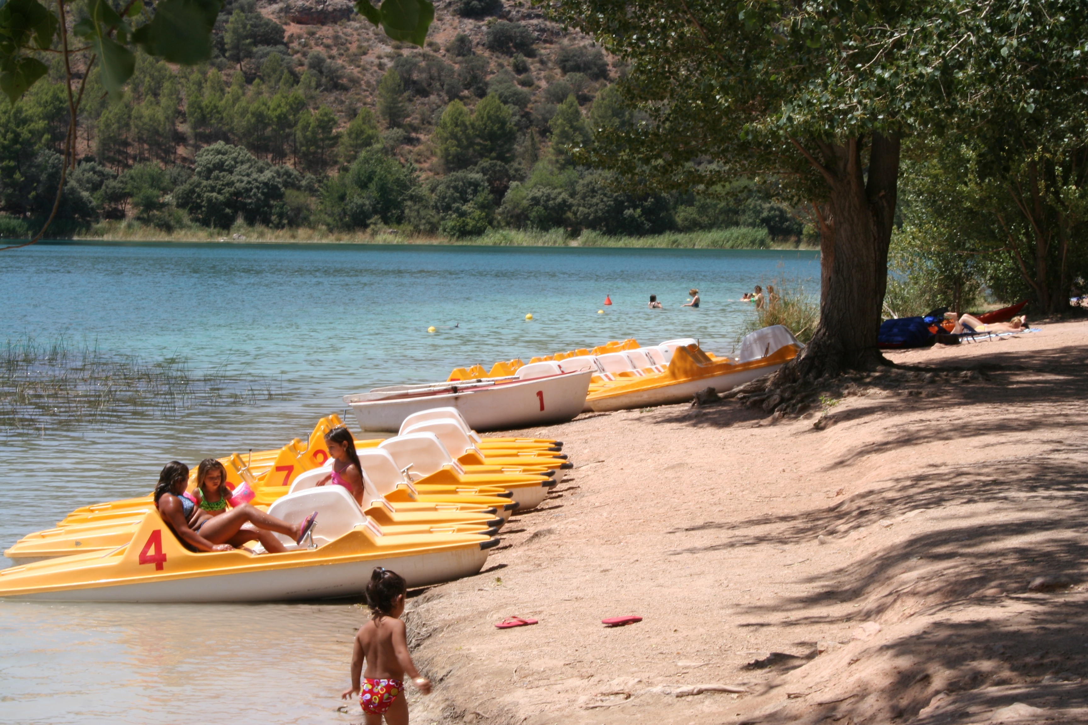 Patines de pedales en la playa de la laguna Santos Morcillo